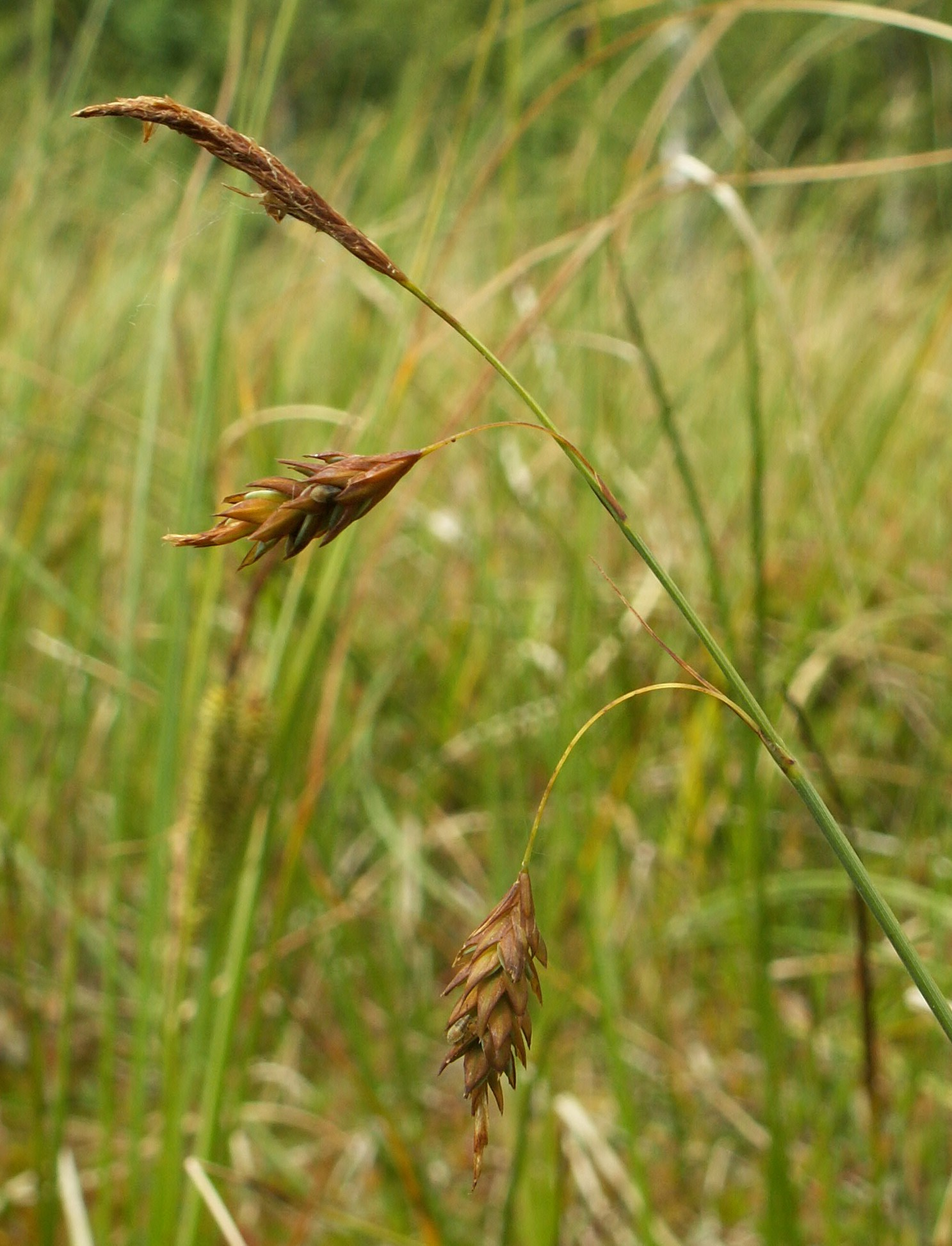 Carex limosa. Głowacz Reserve, Insko Lakeland, NW Poland